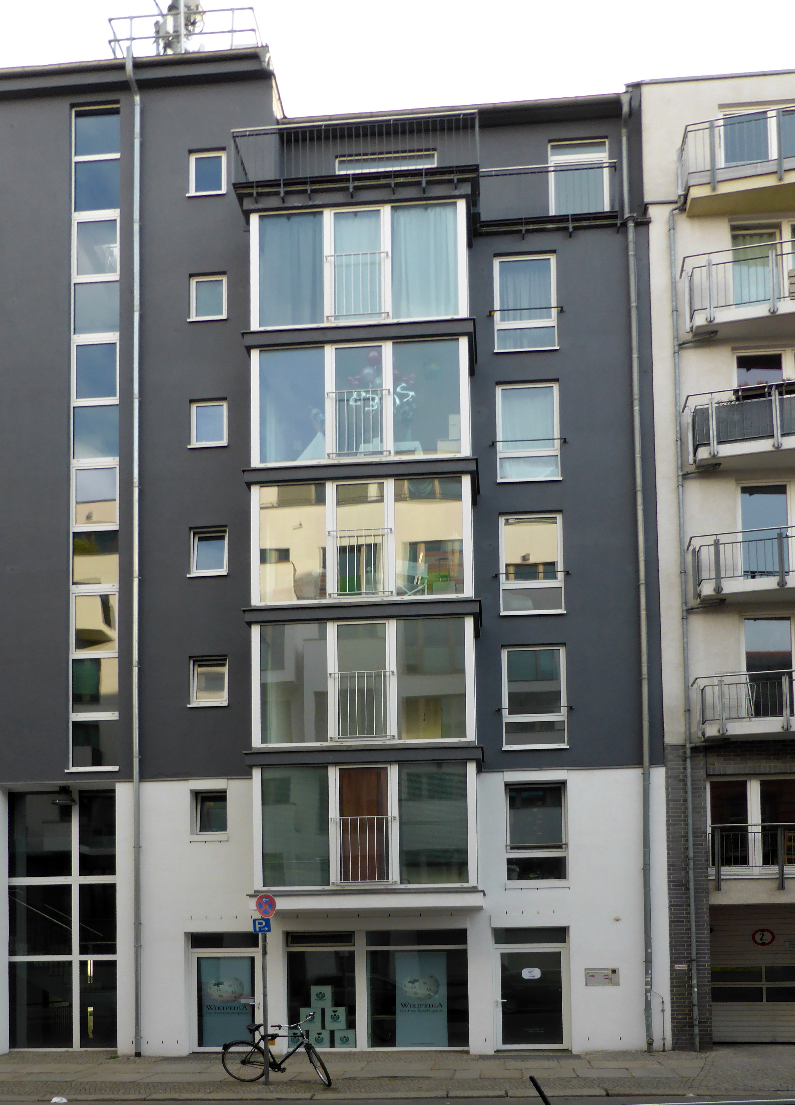 WikiBär, Gartenstraße 92, 10115 Berlin-Mitte.